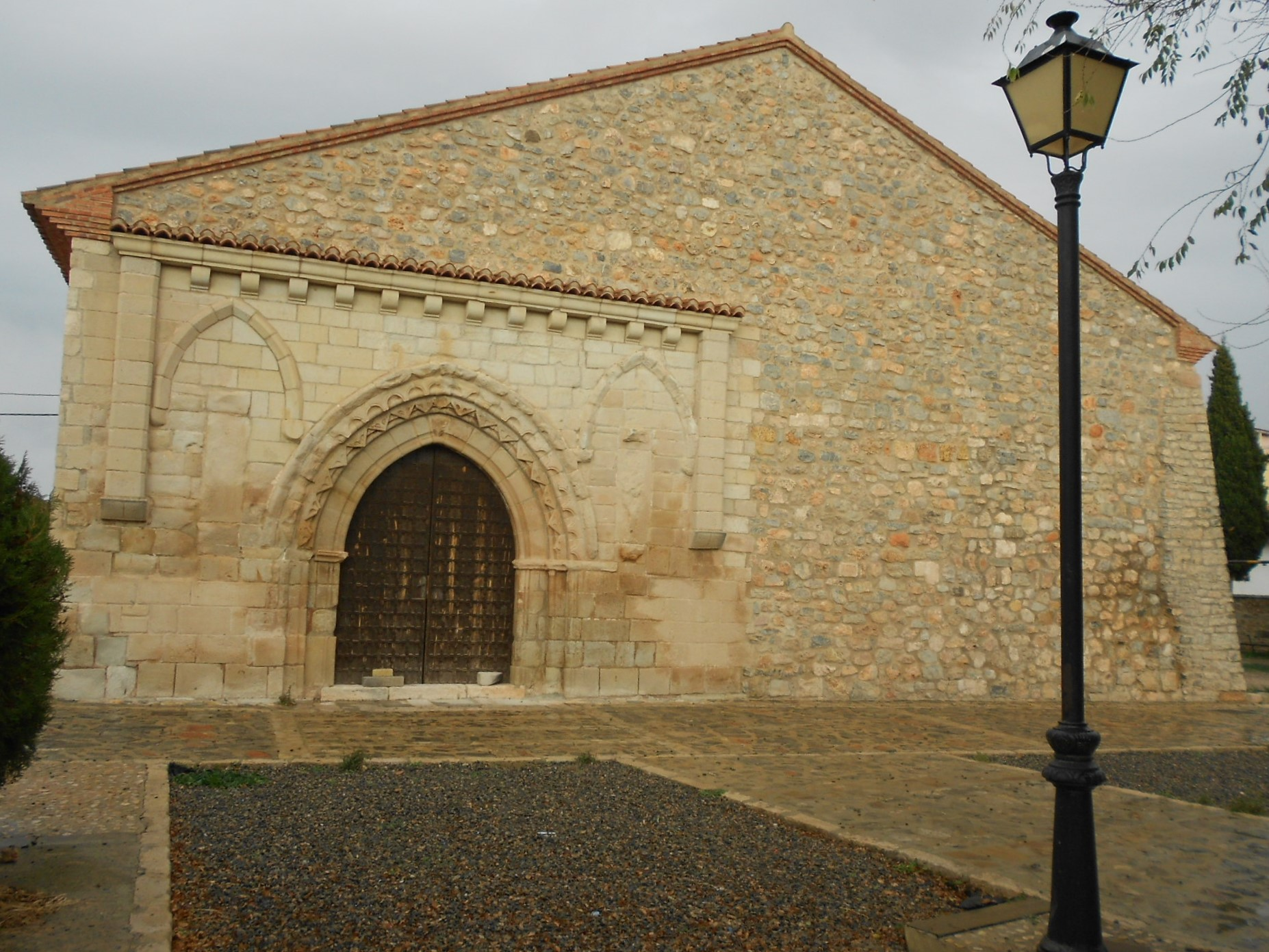 Ermita de la Sangre de Cristo (Sarrión, España)